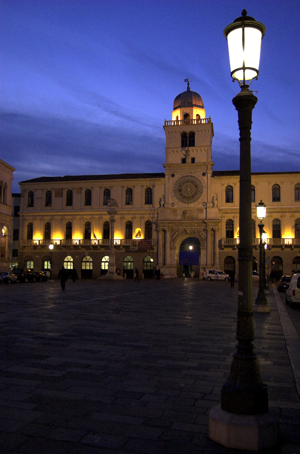 Piazza del Capitanio a Padova